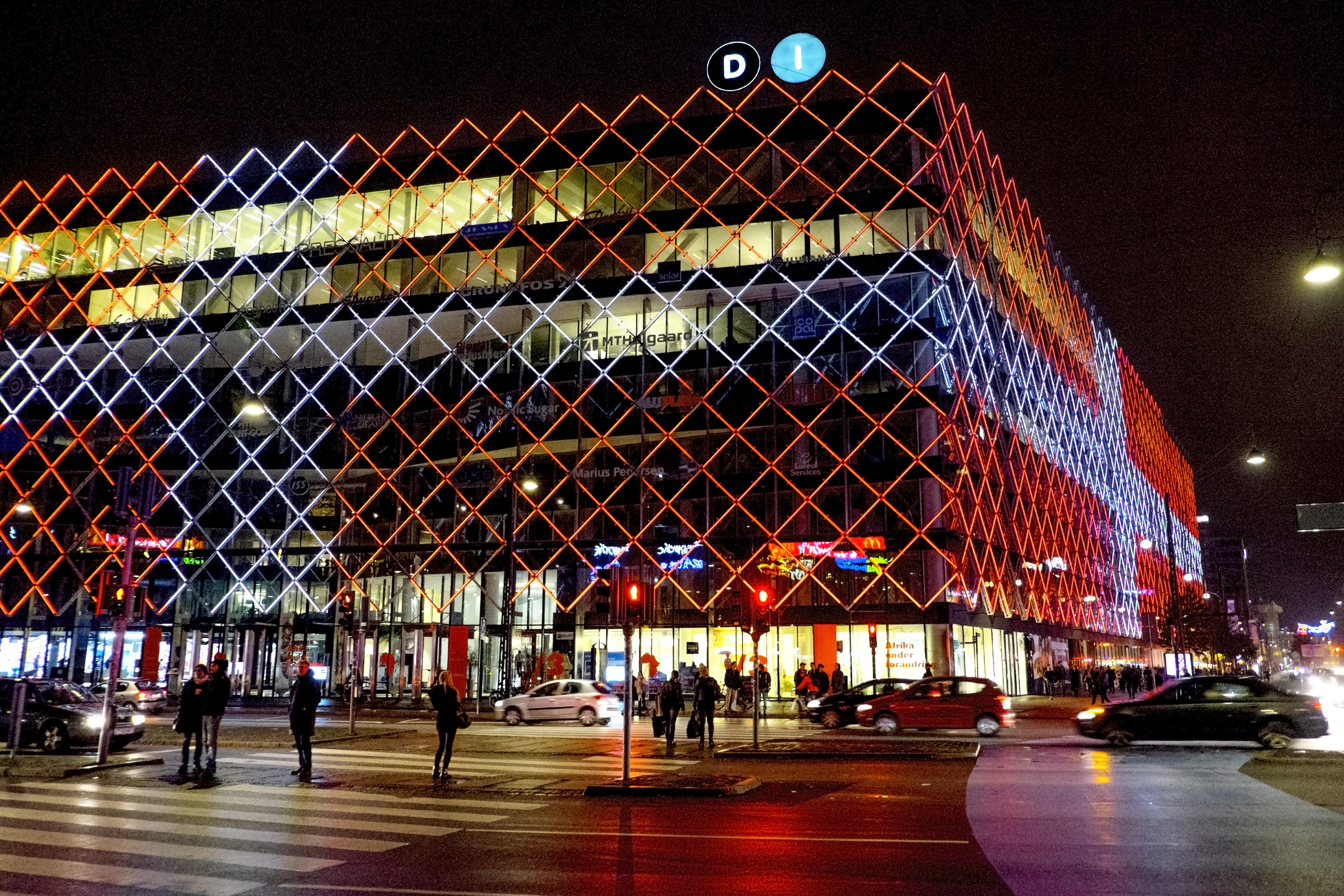 Dansk Industris kontorshus vid Rådhuspladsen i Köpenhamn belystes på kvällen den 1 oktober 2014 omväxlande som en dansk och en svensk flagga. Photo: News Øresund - Johan Wessman © News Øresund (CC BY 3.0) Detta verk av News Øresund är licensierat under en Creative Commons Erkännande 3.0 Unported-licens (CC BY 3.0). Bilden får fritt publiceras under förutsättning att källa anges (Foto: News Øresund + fotografnamn). The picture can be used freely under the prerequisite that the source is given .News Øresund, Malmö, Sweden. Øresund är en oberoende regional nyhetsbyrå som ingår i projektet Øresund Media Platform som drivs av Øresundsinstituttet i partnerskap med Lunds universitet och Roskilde Universitet och med delfinansiering från EU (Interreg IV A Öresund) och 14 regionala; icke kommersiella aktörer.